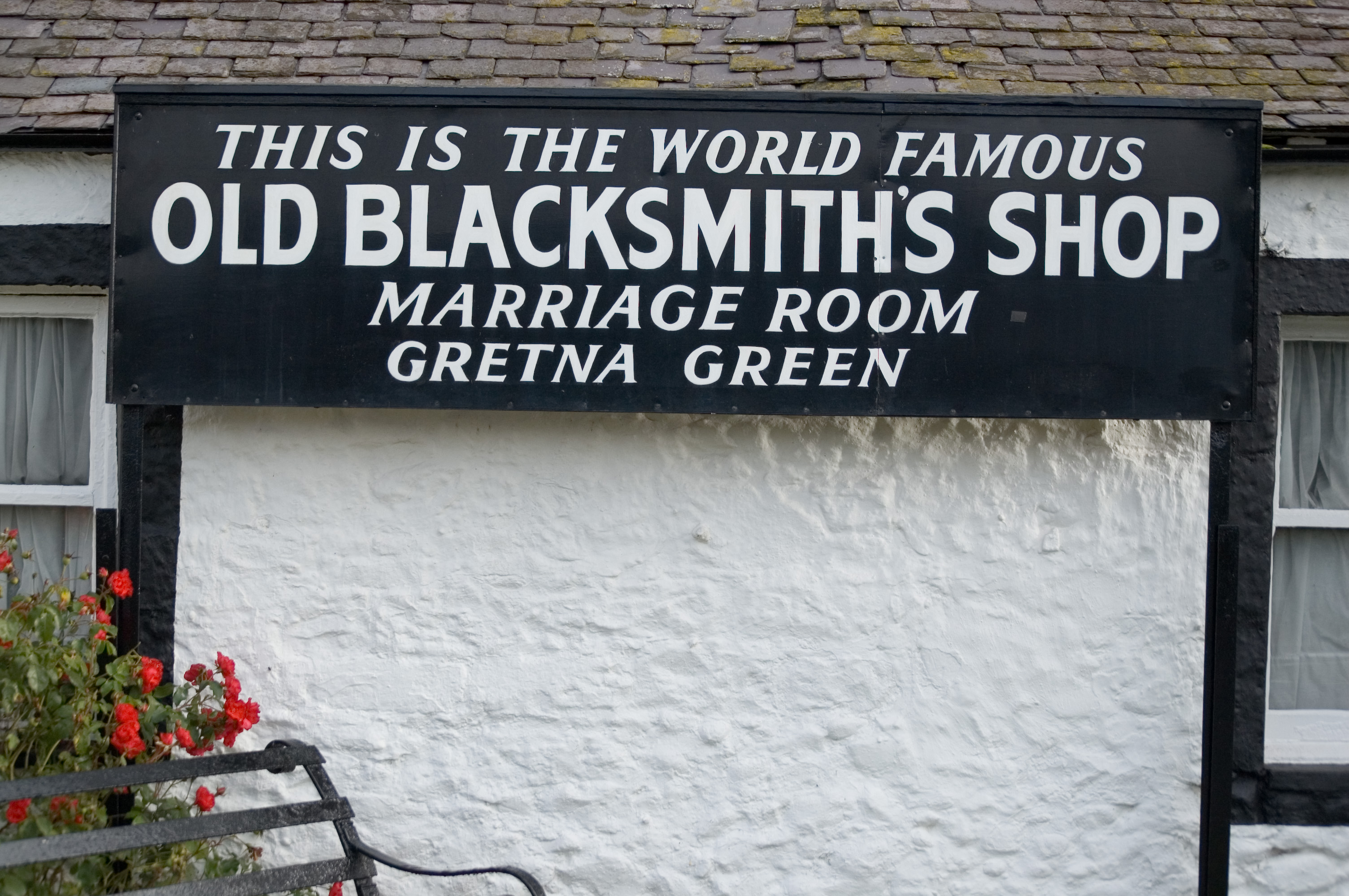 Grenta Green